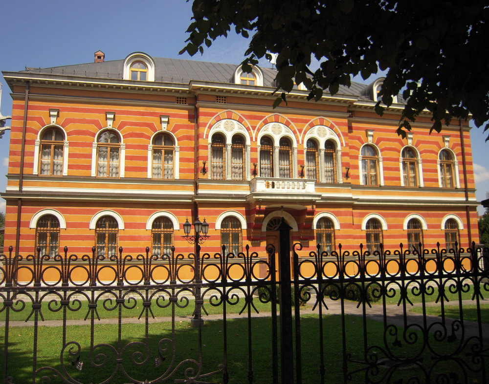 Владичански_двор_(Бања_Лука)